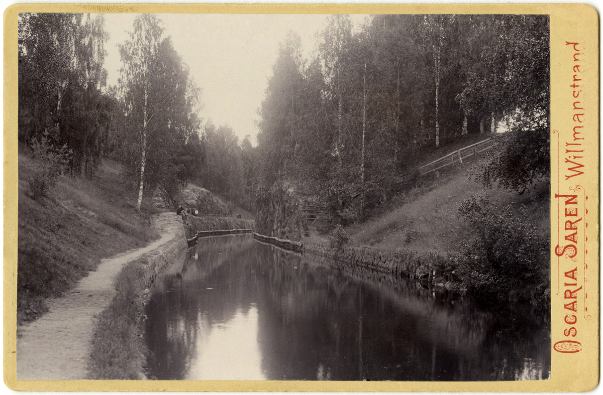 Saimaan kanava Lauritsalassa. Valokuvaaja Oscaria Sarén, 1898. Etelä-Karjalan museon kuva-arkisto.